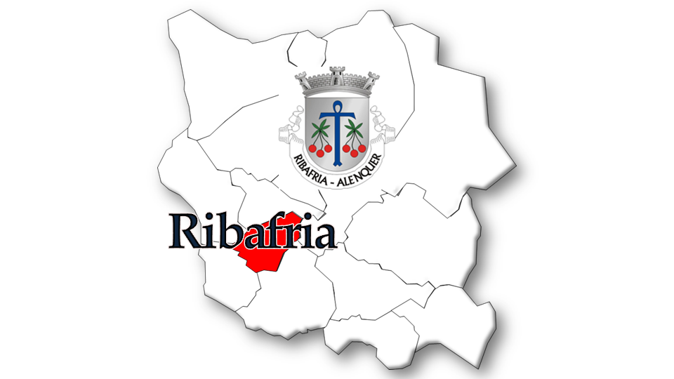 Evolução da População